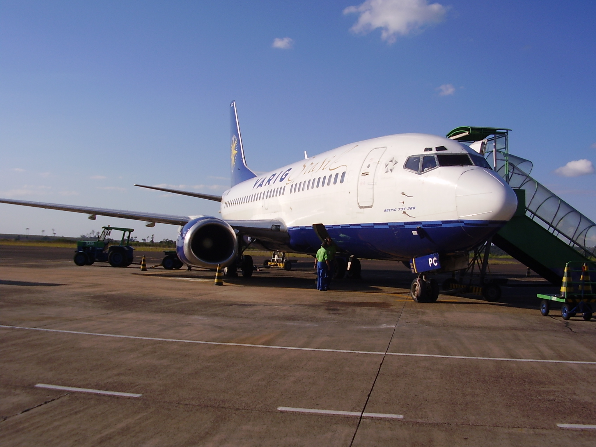 Avião da Varig em Foz do Iguaçu, Brasil.